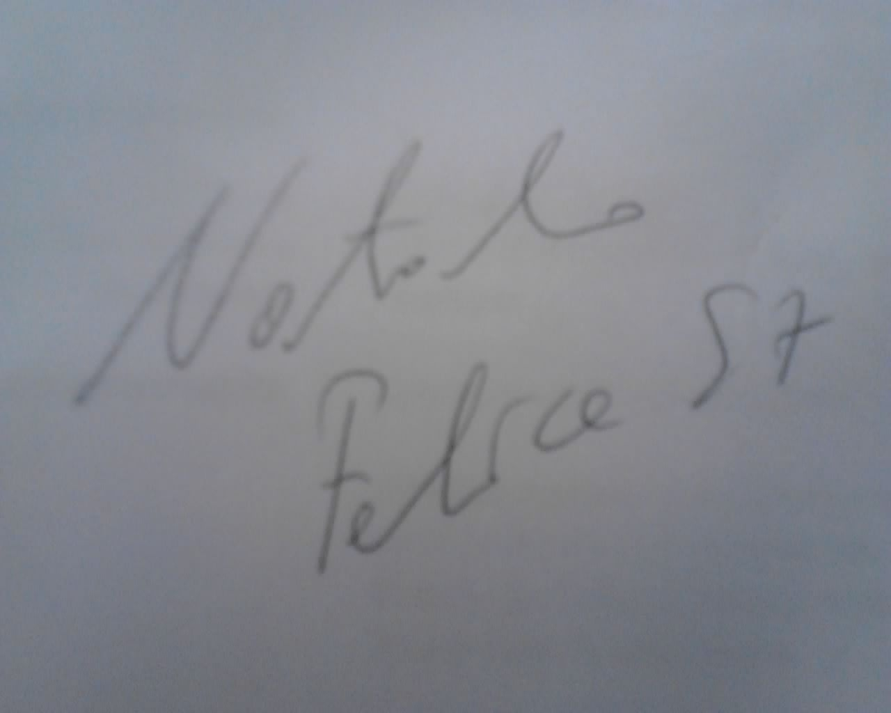 Natalino's sign